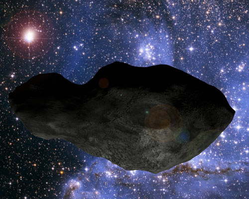 Rappresentazione digitale dell'asteroide 216 Kleopatra.